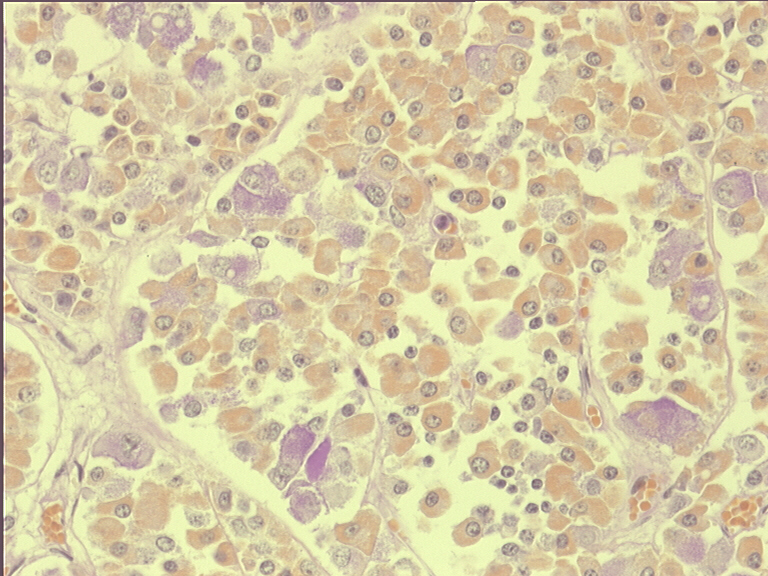 Hypophysenvorderlappengewebe